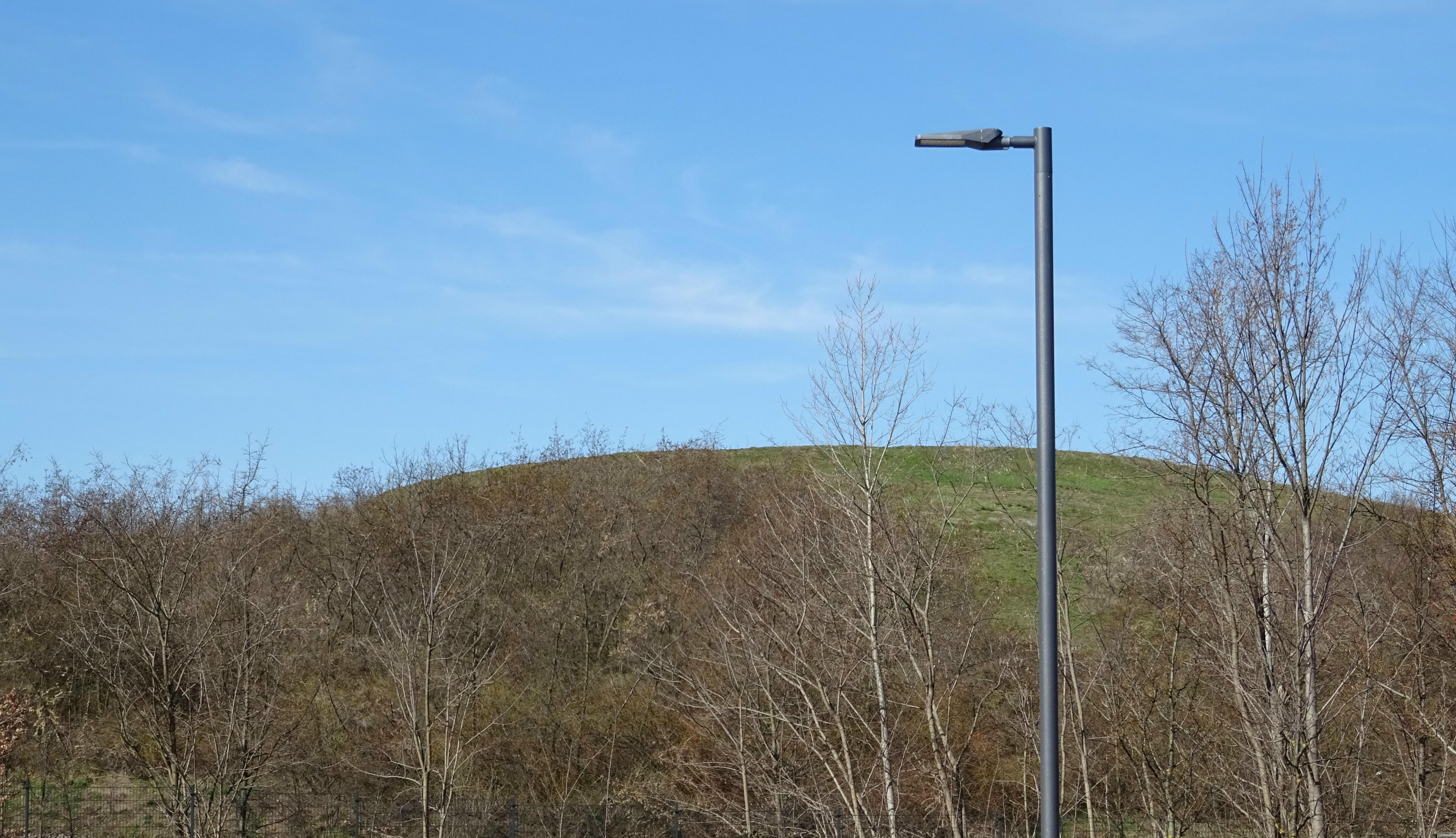 Hellerberge, Hellersiedlung am 16. März 2019, begrünte Mülldeponie